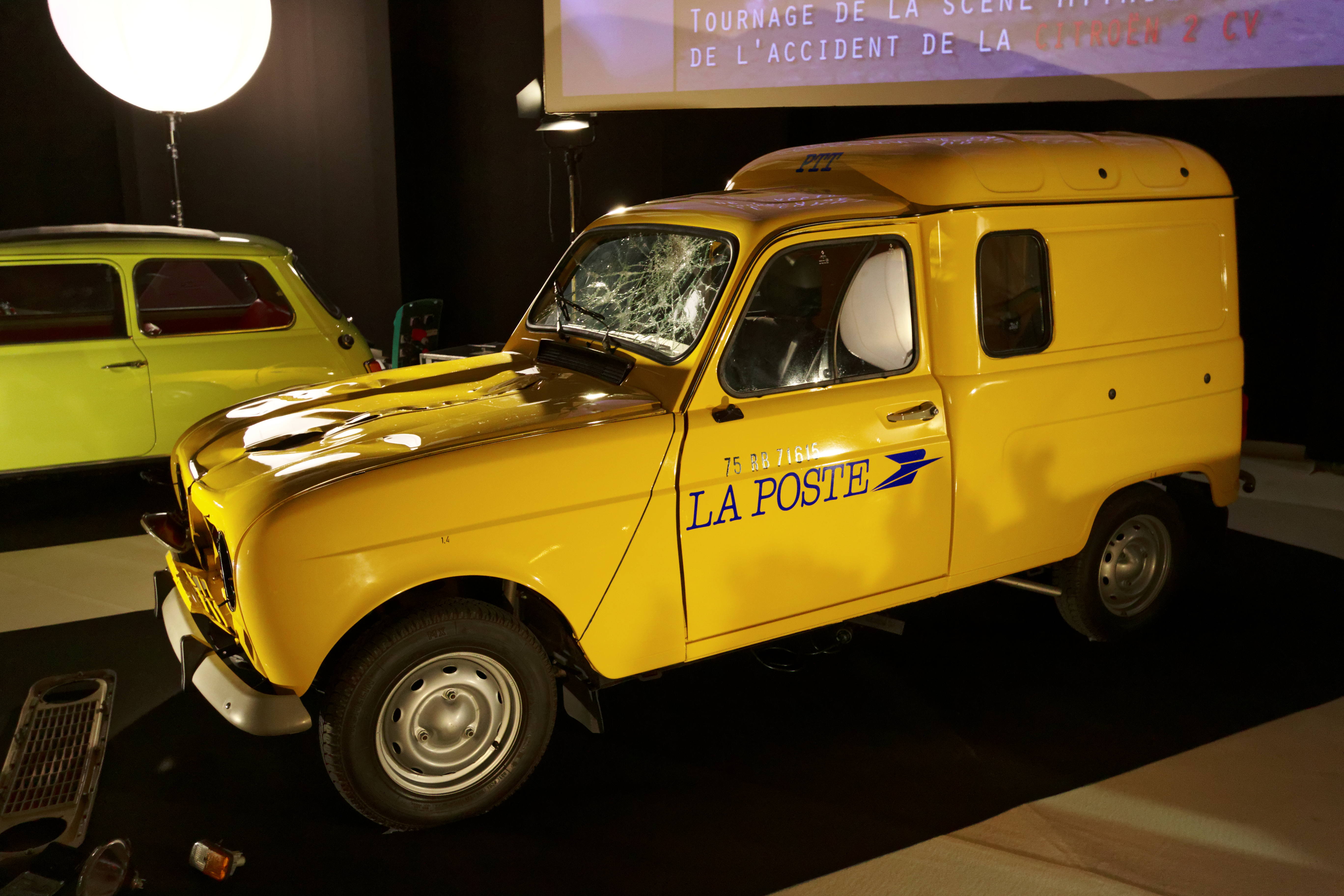 Une Renault 4F4 de 1993 présentée lors du mondial de l'automobile de Paris 2016. Cette voiture a été utilisée sur le tournage du film les visiteurs'.